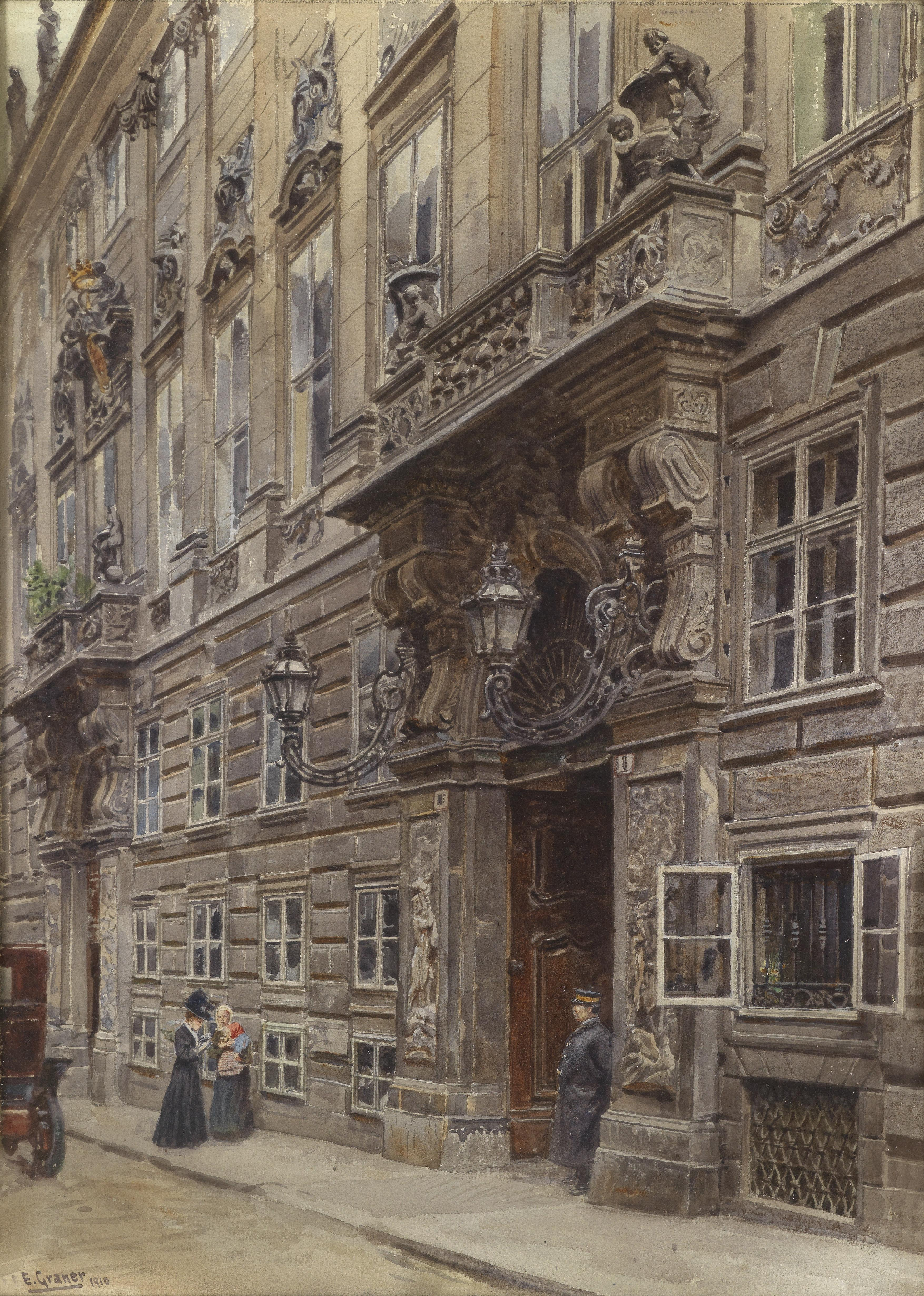 Palais des Prinzen Eugen in der Himmelpfortgasse